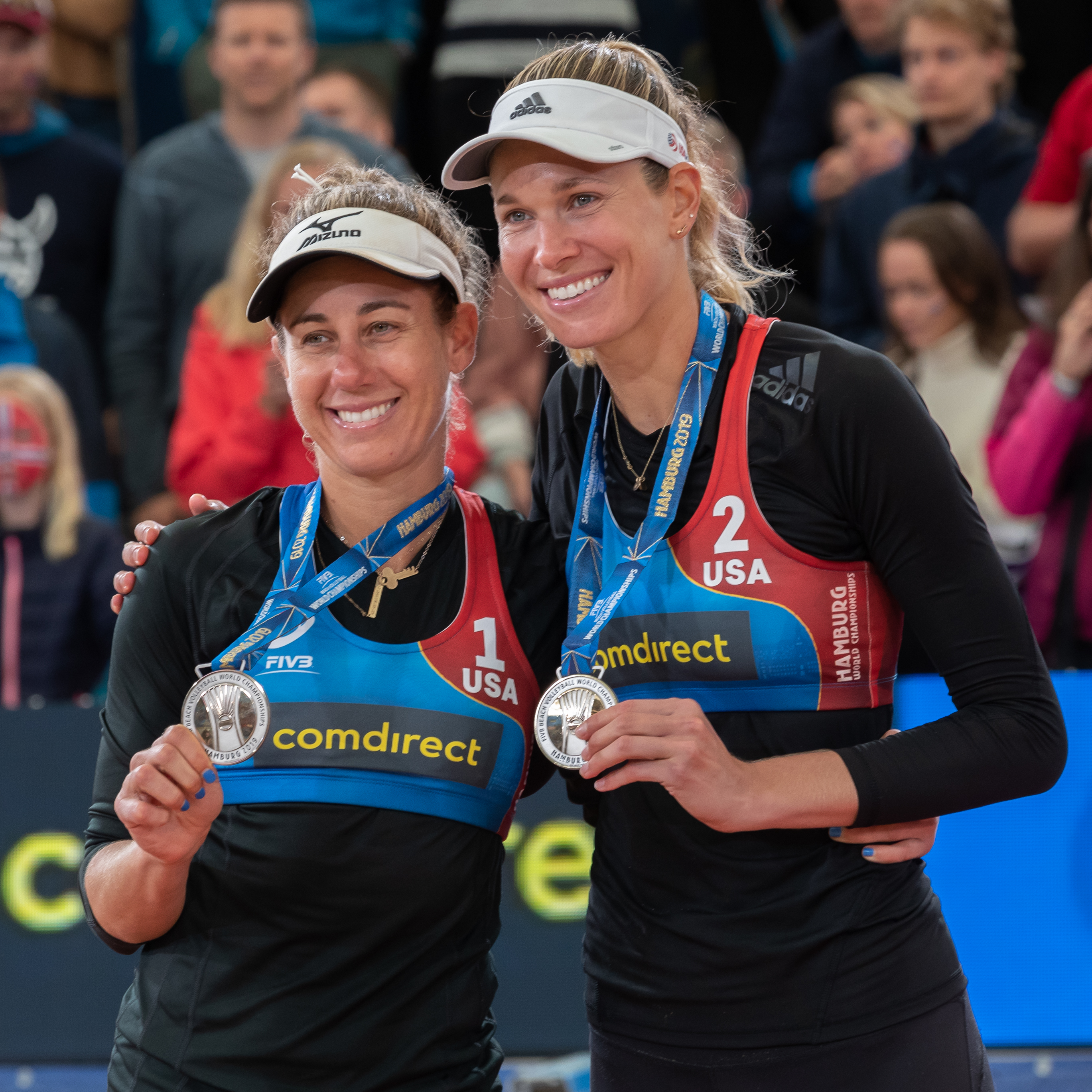 BeachVolleyball Weltmeisterschaft Hamburg 2019; v.li.: April Ross (USA), Alix Klineman (USA); Zweitplatzierter, Silbermedaille, silver medal; Flower Ceremony, Blumenzeremonie, Siegerehrung